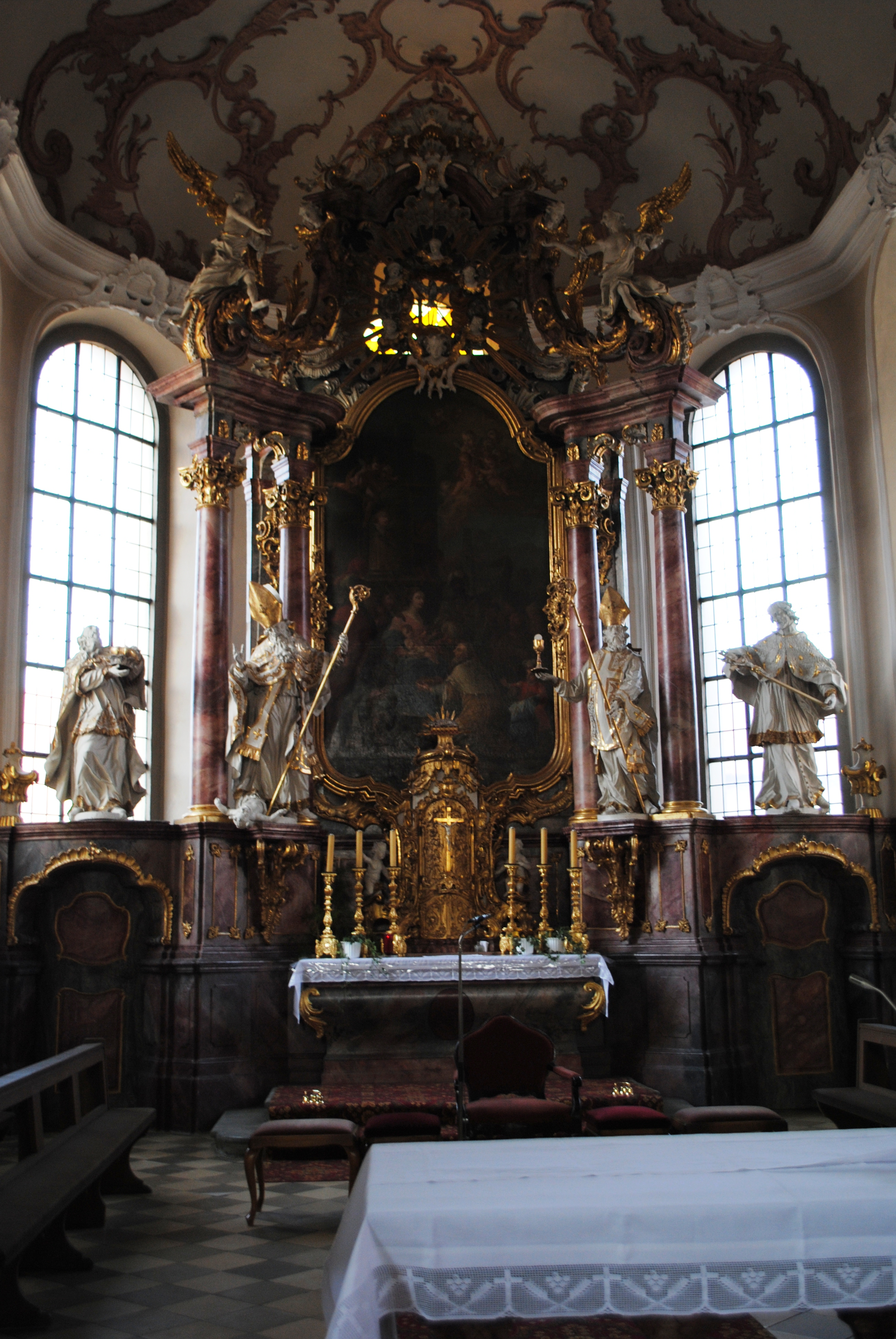 Hauptaltar, Kirche, Sommerach